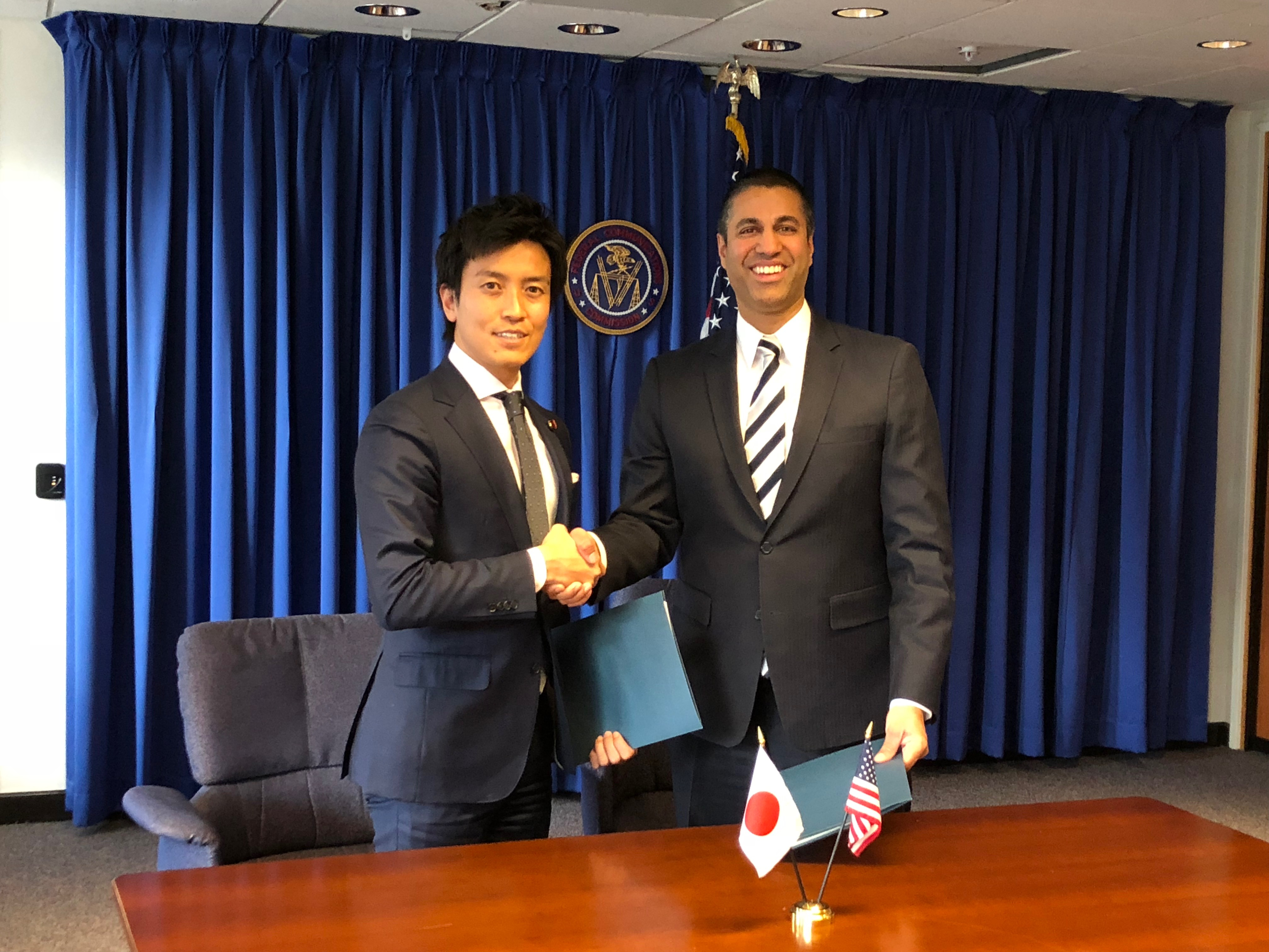 img02